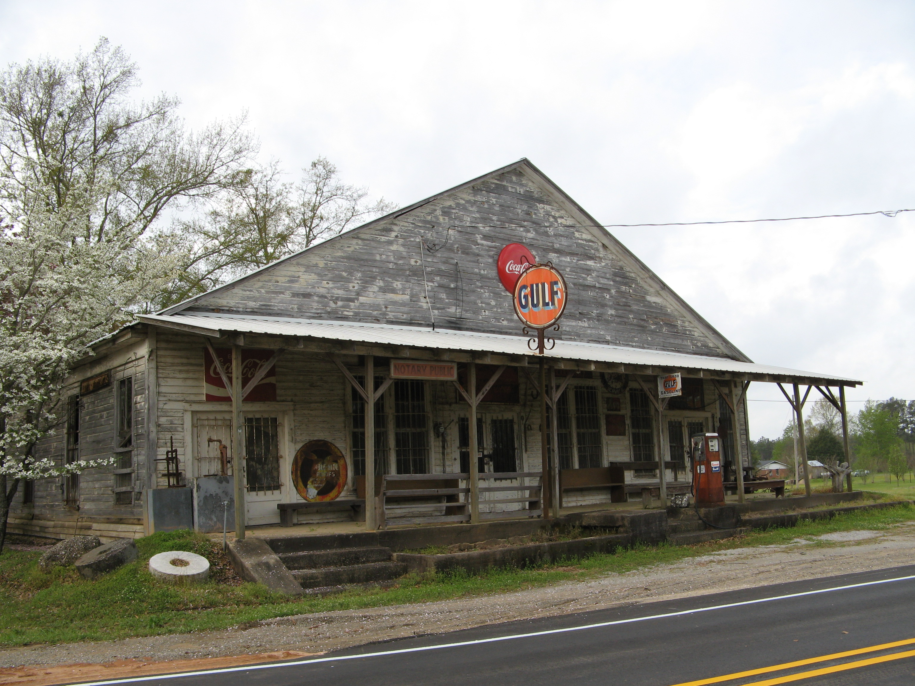 Ward, Alabama